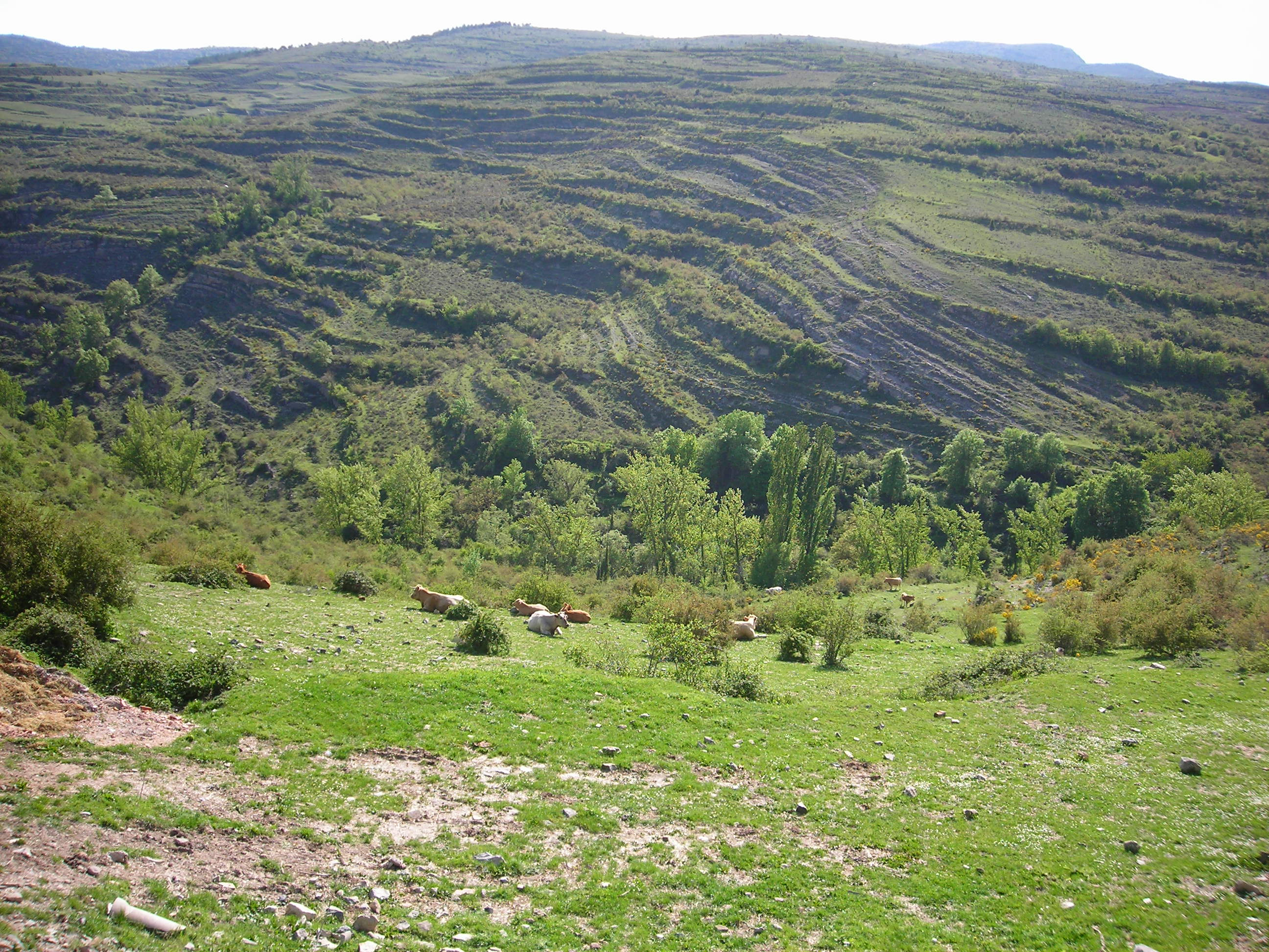 Vista de unos bancales desde Trevijano